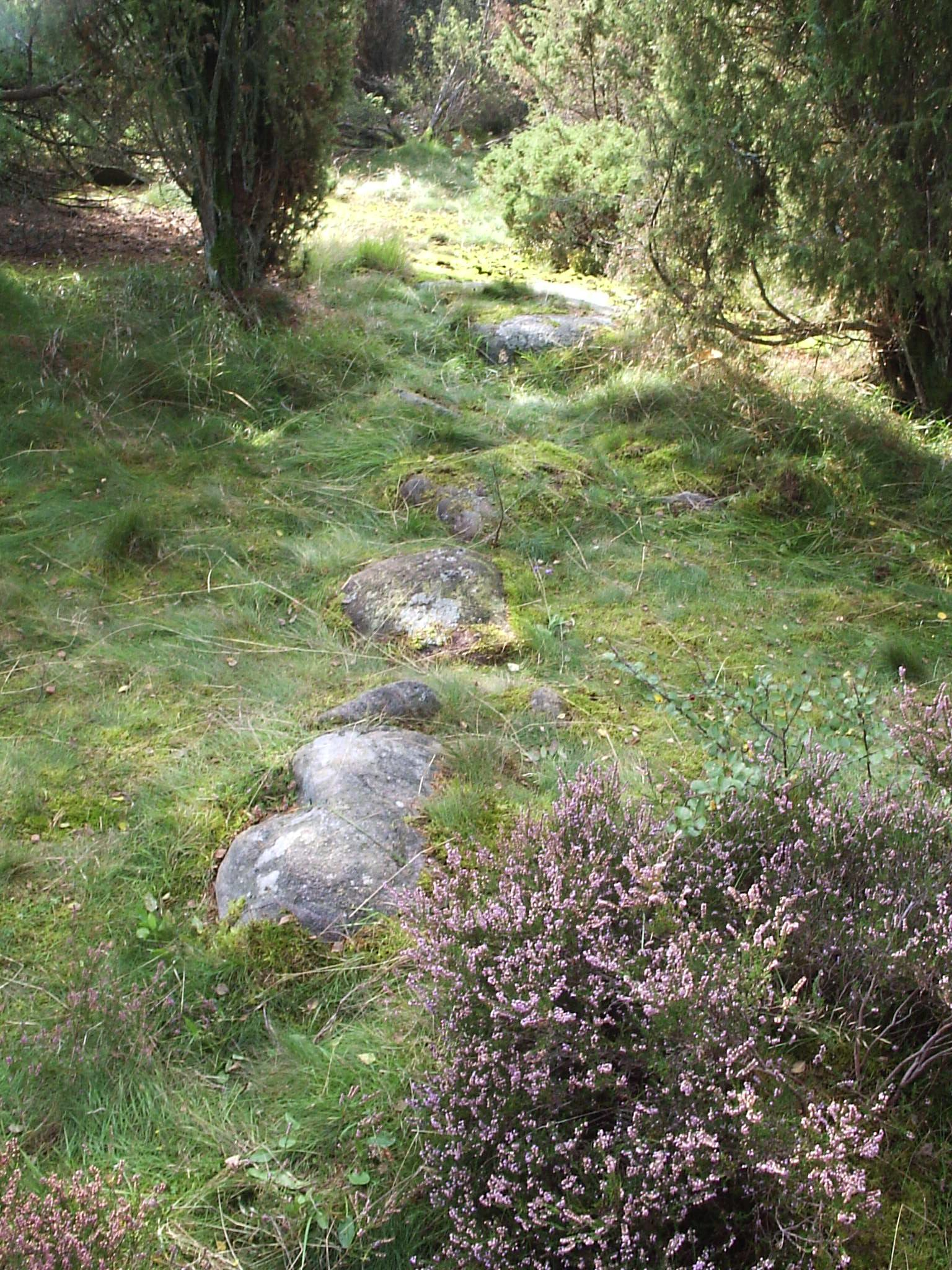 Stensträng på Askesby hög i Säve socken, Västra Hisings härad, Hisingen, Göteborgs kommun, Bohuslän, Västra Götalands län, Sverige. Fotograferad den 8 september 2005 av Harri Blomberg.